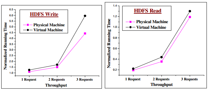 Cluster physique vs cluster machine virtuelle